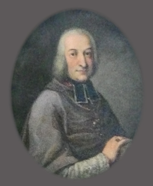 Passau, Dom St. Stephan Grabdenkmal des Bischofs Thomas Johann von Thun und Hohenstein, Detail: Porträt des Bischofs